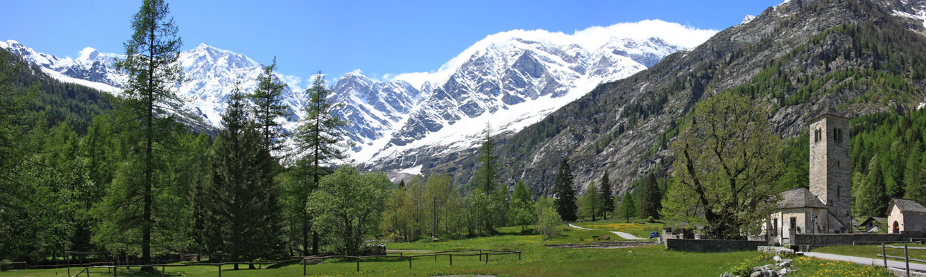 Panorama sul gruppo del Monte Rosa dalla frazione Staffa di Macugnaga. Sulla destra la chiesa vecchia ed il tiglio monumentale